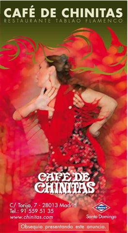 Anuncio del tablao flamenco Café de Chinitas, en Madrid, España.